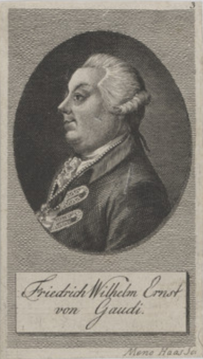 Friedrich Wilhelm Ernst von Gaudi (1725–1788), preußischer Generalleutnant und Militärhistoriker.